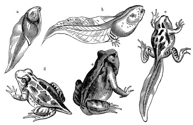 Entwickelung des Krötenfrosches. a Larve ohne Extremitäten, mit hohem Flossenkamm; b ältere Larve mit hintern Gliedmaßen; c geschwänzte Larve mit beiden Gliedmaßenpaaren; d junger Frosch mit, e ohne Schwanzstummel.